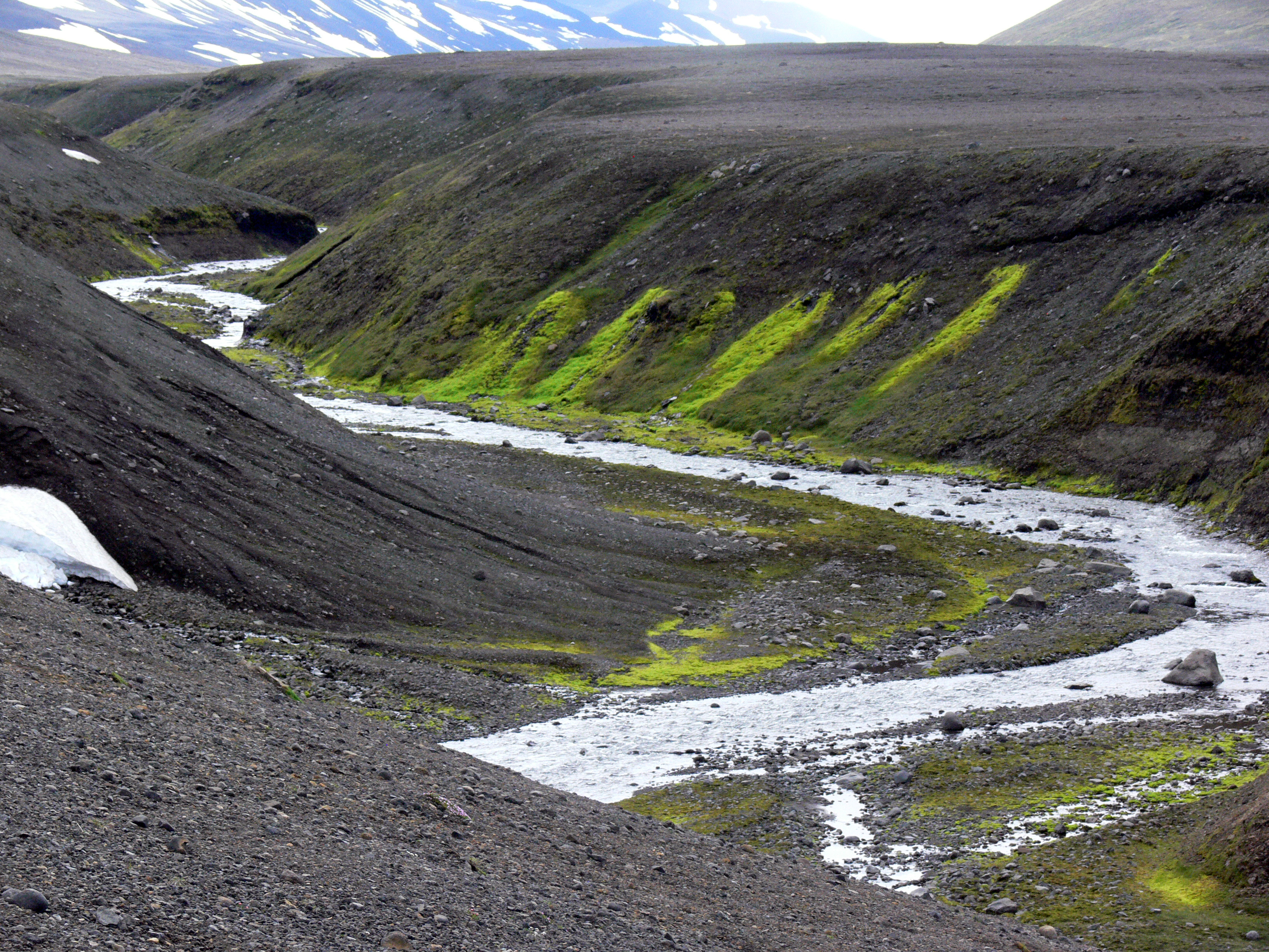 Moos in der Nähe von Snæfell in Ostisland.